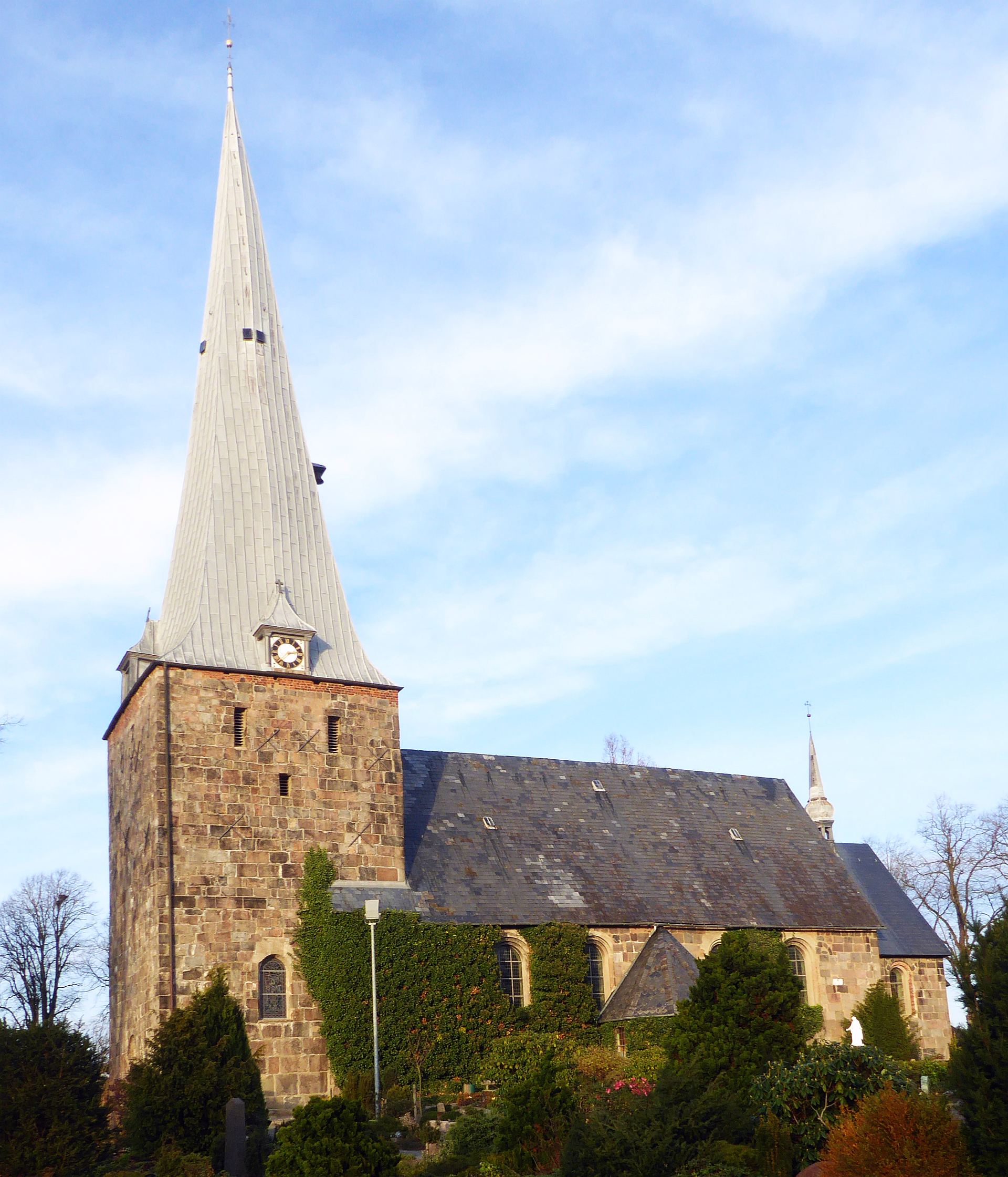 Sörup St-Marien-Kirche romanische Natursteinquader-Kirche (Basalt) 12 Jh mit spätgotischem Turm - Foto 2018 Wolfgang Pehlemann P1280569